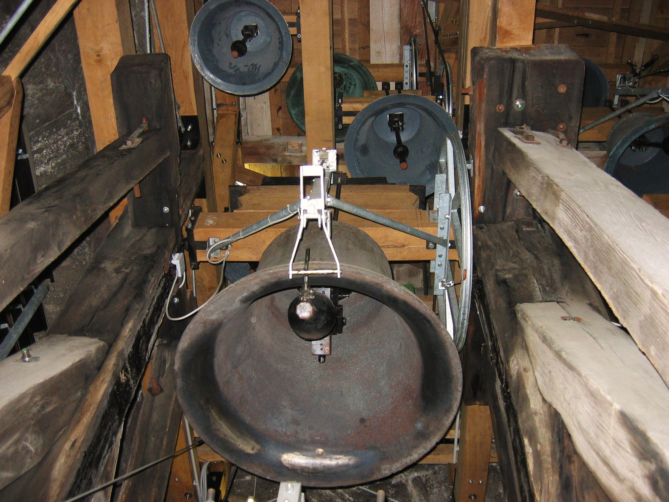 Glockenstuhl der Franziskanerkirche in Salzburg